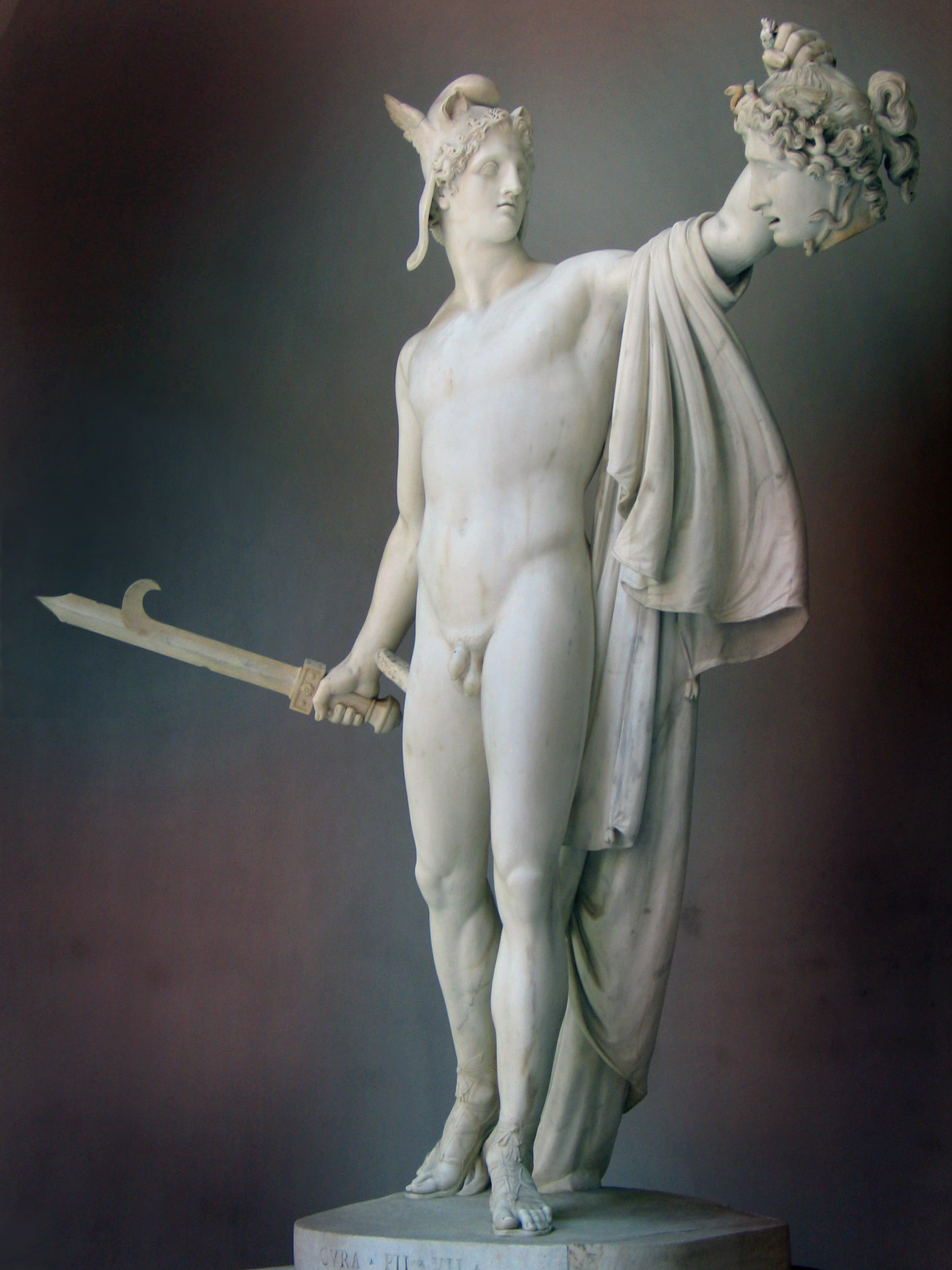 Perseus